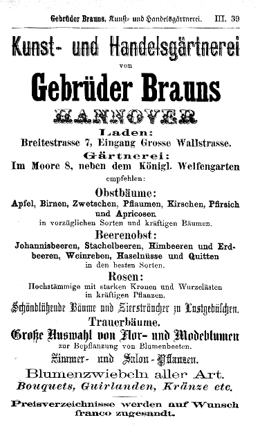 Ganzseitige Anzeige im Geschäftsanzeiger des Adreßbuch, Stadt- und Geschäftshandbuch der Königlichen Residenzstadt Hannover und der Stadt Linden, Abteilung III, Seite 39 mit dem Text „Kunst- und Handelsgärtnerei von Gebrüder Brauns Hannover Laden: Breitestraße 7, Eingang Grosse Wallstrasse. Gärtnerei: Im Moore 8, neben dem Königl. Welfengarten empfehlen: Obstbäume: Apfel, Birnen, Zwetschen, Pflaumen, Kirschen, Pfirsich und Apricosen in vorzüglichen Sorten und kräftigen Bäumen. Beerenobst: Johannisbeeren, Stachelbeeren, Himbeeren und Erd- beeren, Weinreben, Haselnüsse und Quitten in den besten Sorten. Rosen: Hochstämmige mit starken Kronen und Wurzelästen in kräftigen Pflanzen. Schönblühende Bäume und Ziersträucher zu Lustgebüschen. Trauerbäume. Große Auswahl von Flor- und Modeblumen zur Bepflanzung von Blumenbeeten. Zimmer- und Salon-Pflanzen. Blumenzwiebeln aller Art. Bouquets, Girlanden, Kränze etc. Preisverzeichnisse werden auf Wunsch franco zugesandt.“ ...